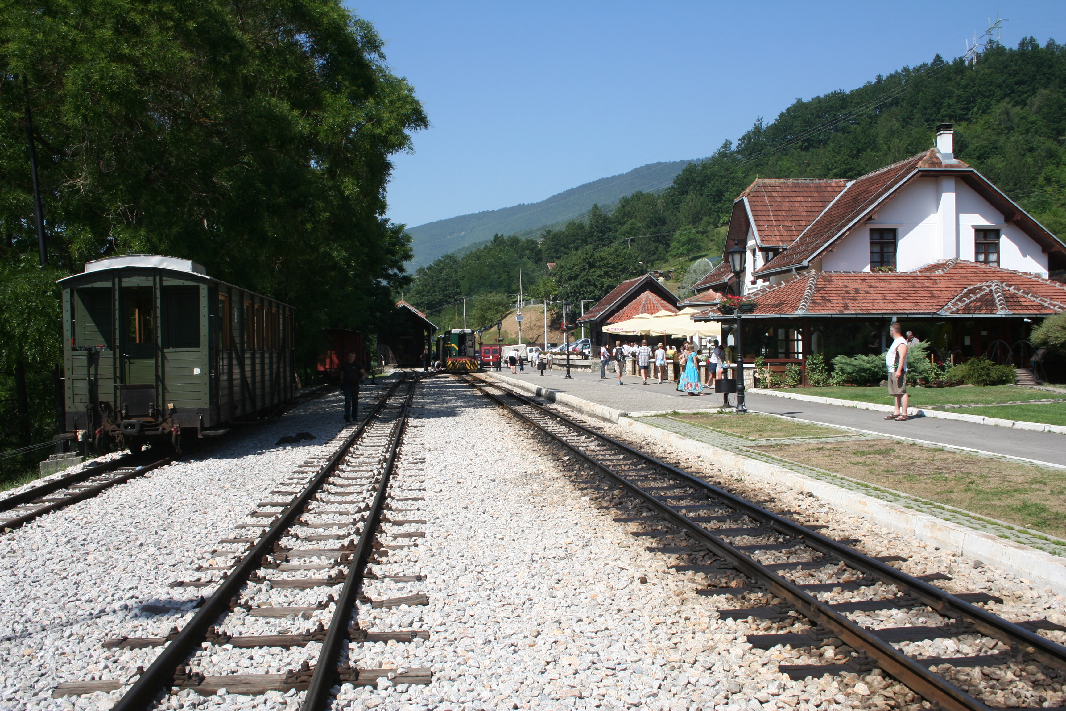 Šarganska osmica, Mokra Gora